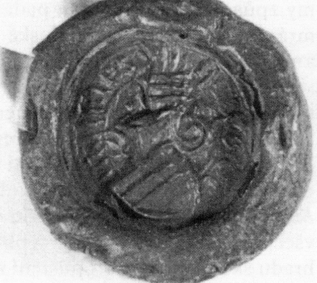 Pečeť Čeňka Kuny z Kunštátu